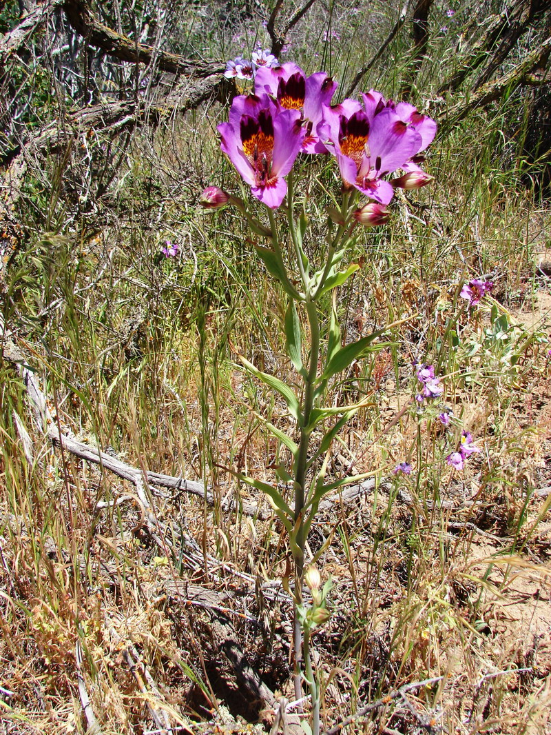 Alstroemeria magnifica - Parque Nacional Fray Jorge